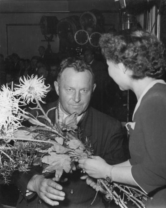 Illus/Quaschinsky 10.10.51 Ausserordentliche Volkskammersitzung Auf einer Außerordentlichen Volkskammersitzung am 10.10.51 antwortete Ministerpräsident Groewohl auf die Vorschläge des Bundestages. UBz: Nationalpreisträger Josef [Sepp] Wenig erhält im Namen des Volkskammerpräsidenten Dieckmann einen Strauss Blumen überreicht.